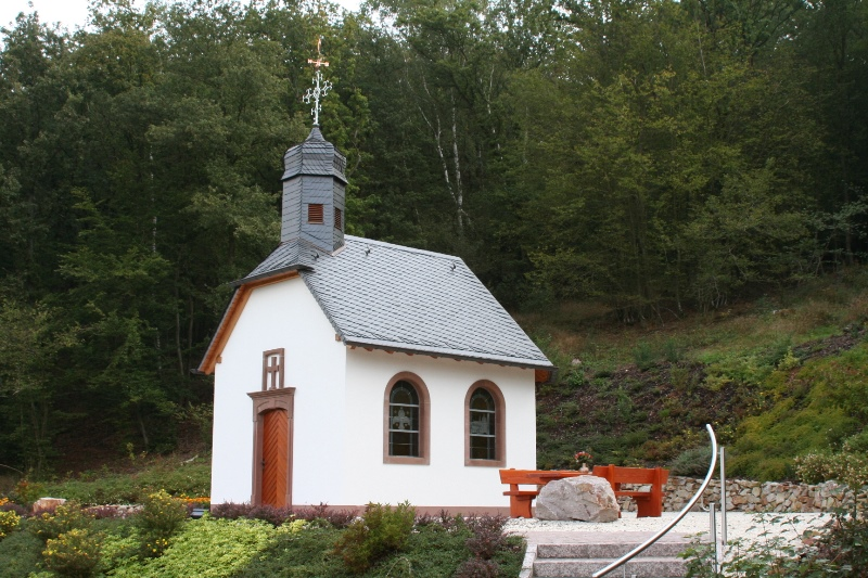 Restaurierte Kapelle